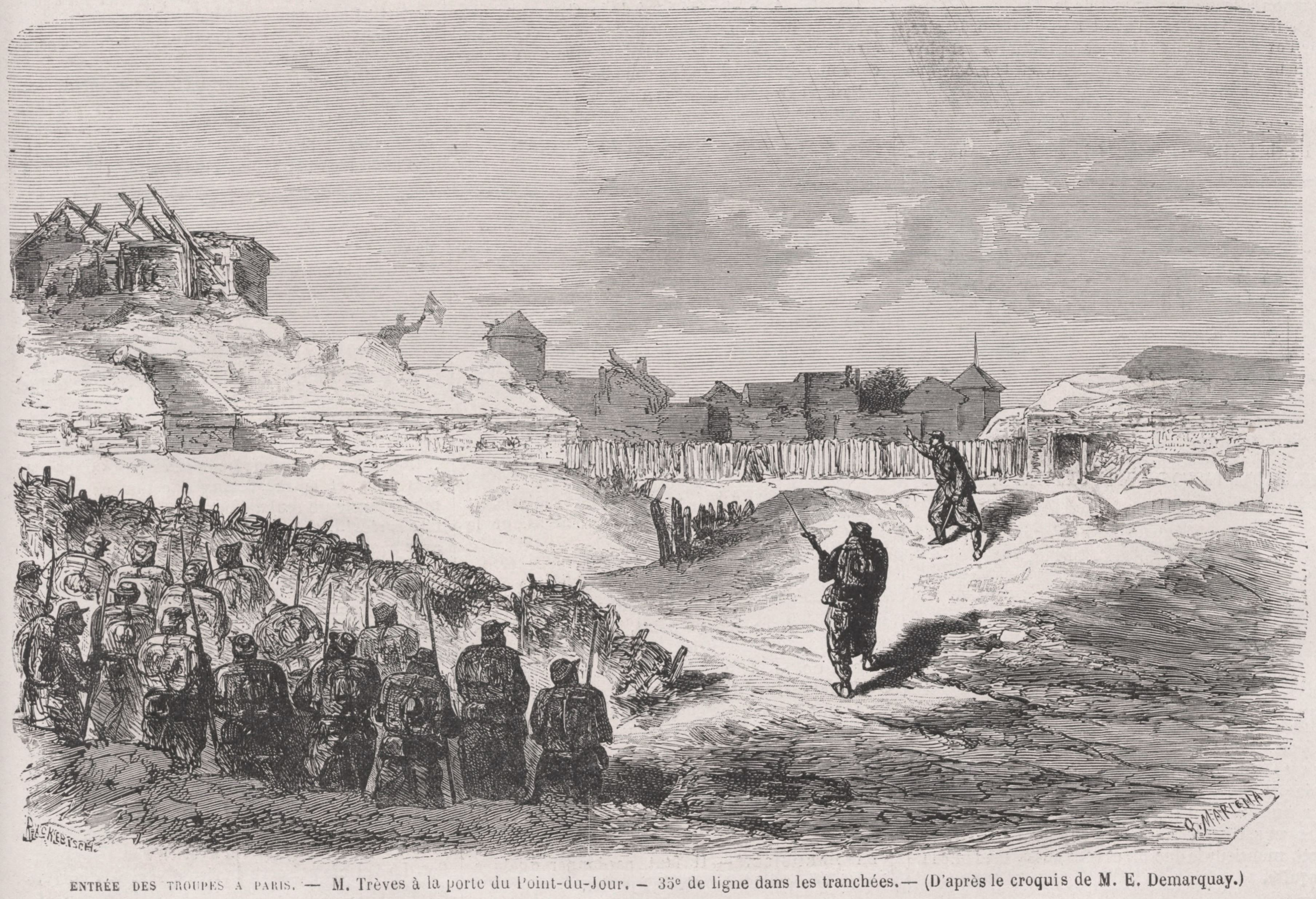 "Entrée des troupes à Paris. M. Trèves [sic] à la porte du Point-du-Jour. 35e de ligne dans les tranchées. (D'après le croquis de M. E. Demarquay)".